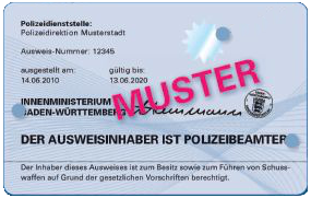 Rückseite des 2011 eingeführten Dienstausweises der Polizei Baden-Württemberg